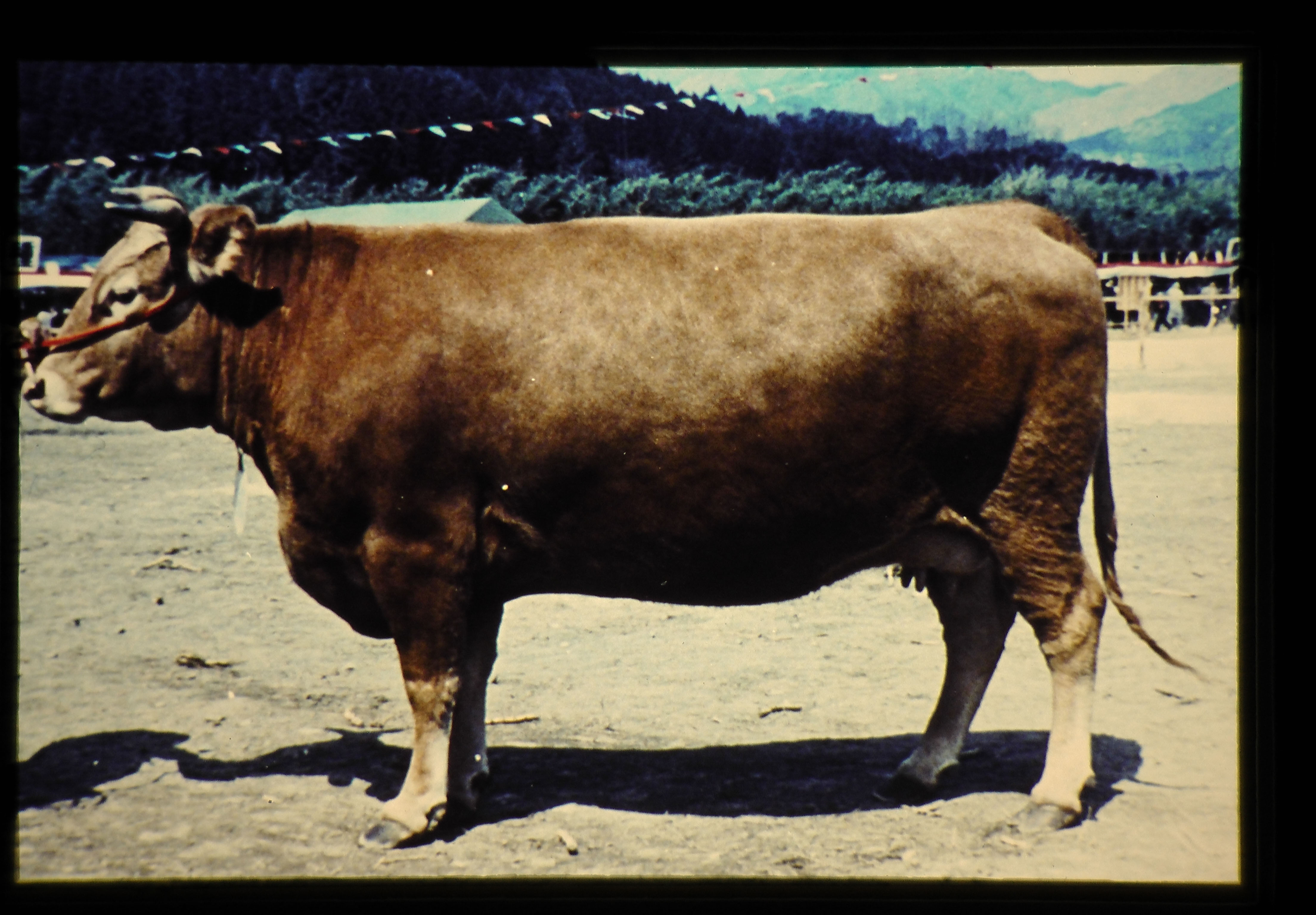 JIRCAS Photo Archive Author: 松川昭義 Description: 毛色は黄褐単色で、体下部、肢内側は淡色、鼻鏡、蹄は肉色。角は側上内方へのび肉色。肩峰はない。小型に近い中型で、体重は♀470kg、体高は♀128cm。肉役体型比率は6.5:3.5。中躯は良く伸びるが後躯は乏しい。かなり長肢で、直飛である。 Country: 日本 (Japan) Keywords: 日本,九州熊本,高知,茨城,畜産 Slide no. 01-064-06 本コンテンツは、政府標準利用規約第2.0版(クリエイティブ・コモンズ 表示 4.0 国際 ライセンス（CC BY）互換)に基づき、出典を明記の上で利用できます。利用条件の内容については「 JIRCAS Webサイトの利用について 」をご参照ください。 印刷物、調査研究等でご利用頂いた場合は、 お問い合わせフォーム にてお知らせ頂ければ幸いです（任意） This content is provided under the terms and conditions of the JIRCAS Website Terms of Use or Creative Commons Attribution 4.0 International (CC BY 4.0) license.